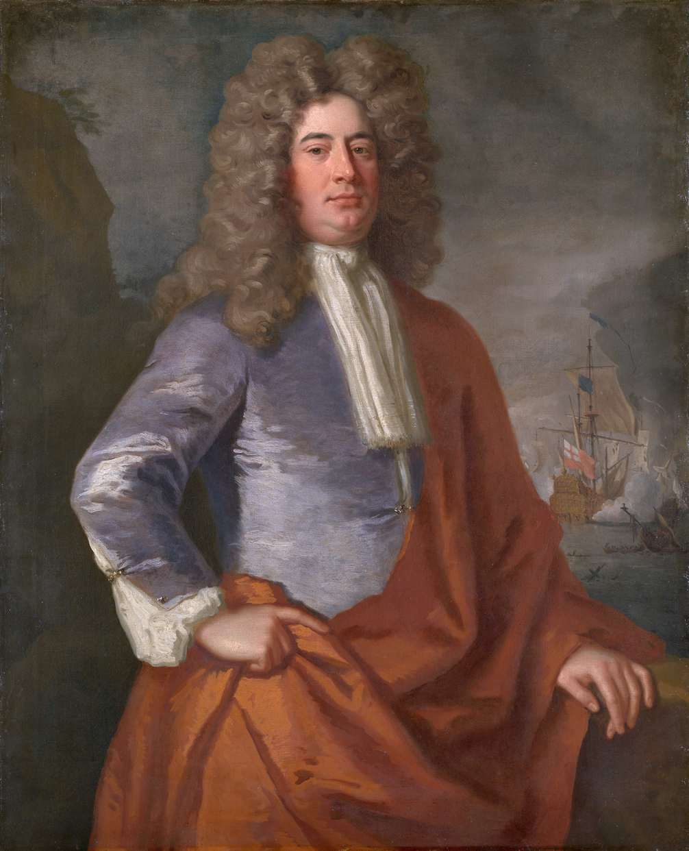 Portrait de l'amiral Mathew Aylmer (1658-1720)